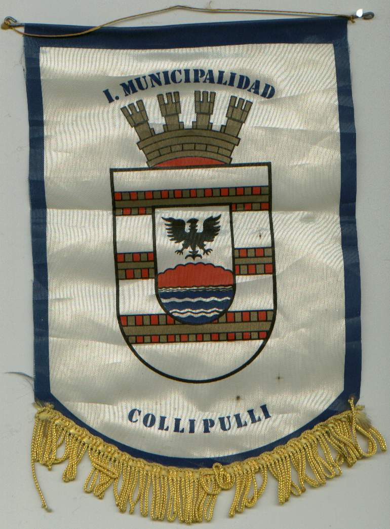 Imagen escaneada del Escudo de Armas de la ciudad de Collipulli.